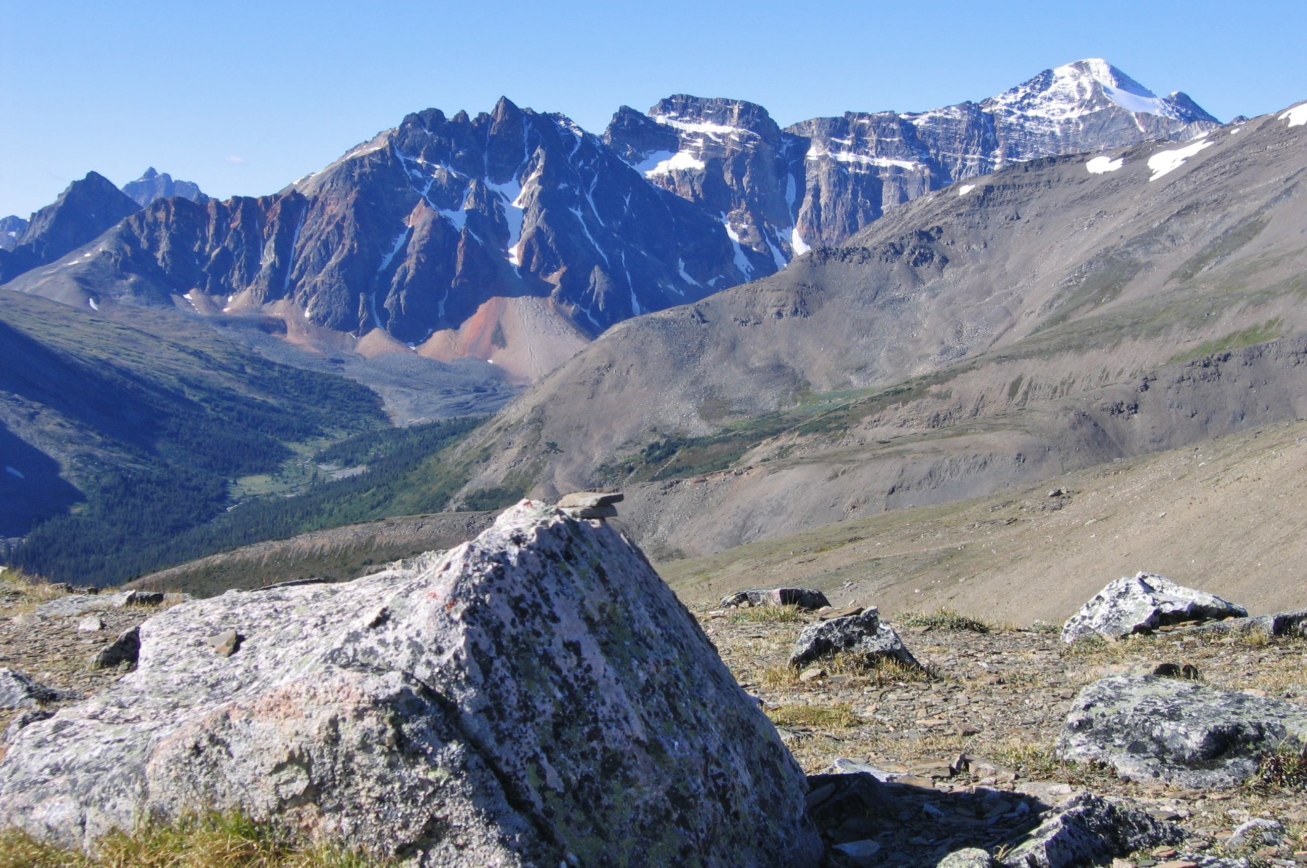 Whistlers Peak